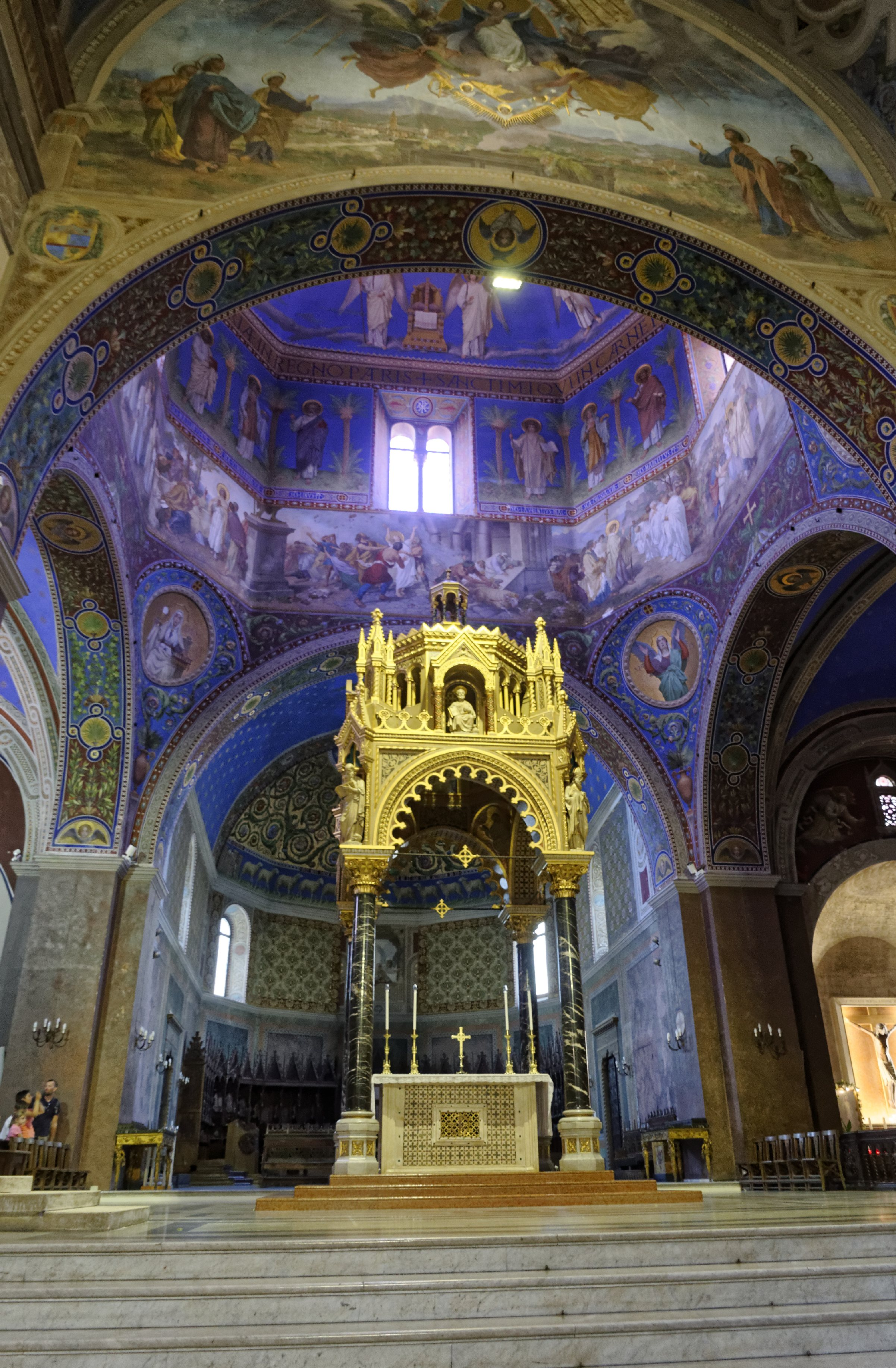 Ascoli Piceno 2015 Dieses Foto entstand in Zusammenarbeit mit Stadtbesichtigungen.de Die Seiten Stadtbesichtigungen.de, der dazugehörige Reise Blog sowie die Facebookseite: Stadtbesichtigungen Rom dürfen dieses Bild für Ihre Veröffentlichungen ohne den Hinweis auf Wikipedia, Commons bzw der Lizenz verwenden. Die Verantwortlichen habe von mir (Ra Boe) die Originaldaten zur freien Verfügung übermittelt bekommen.